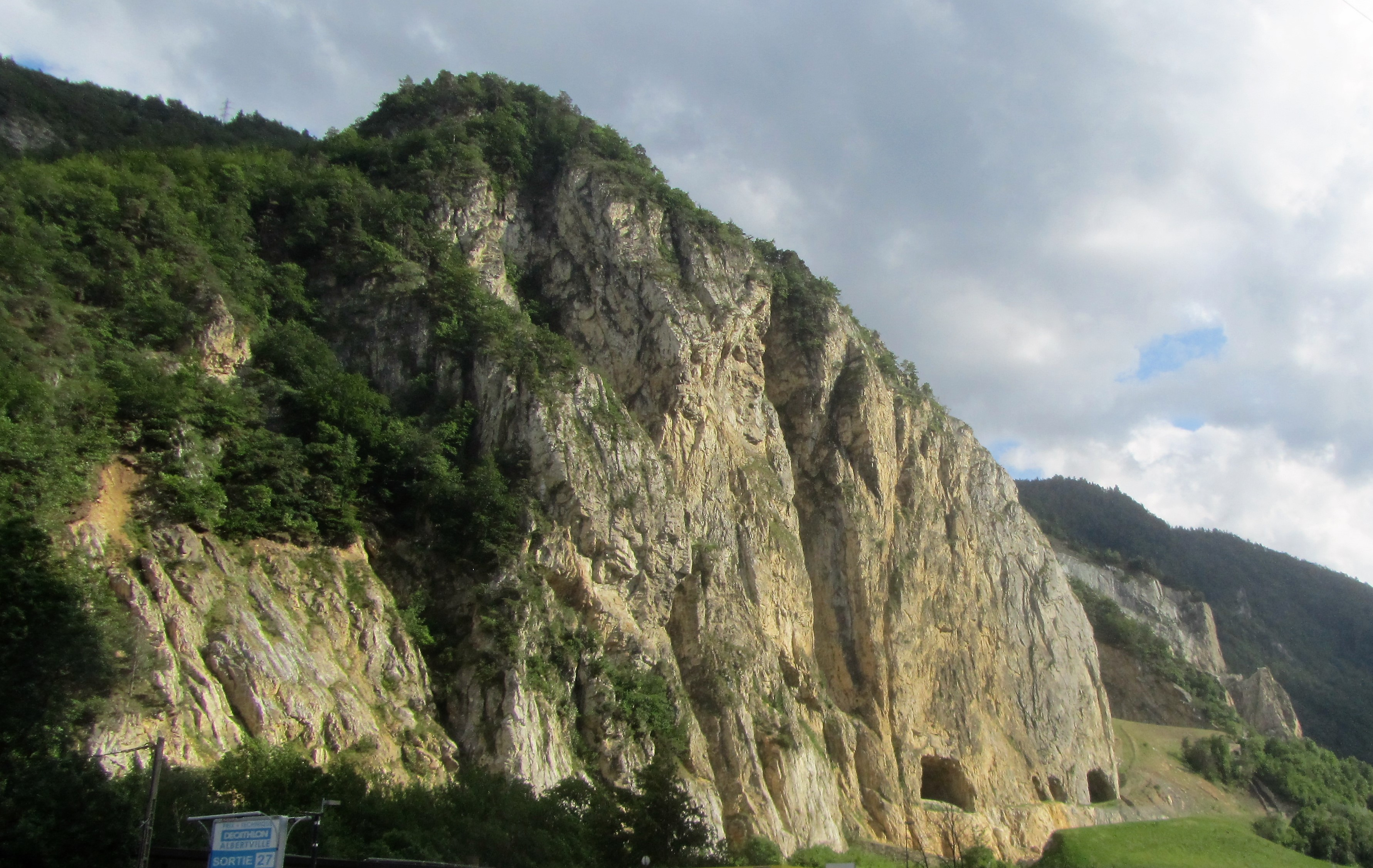 Les carrières pour l'aciérie de Moûtiers